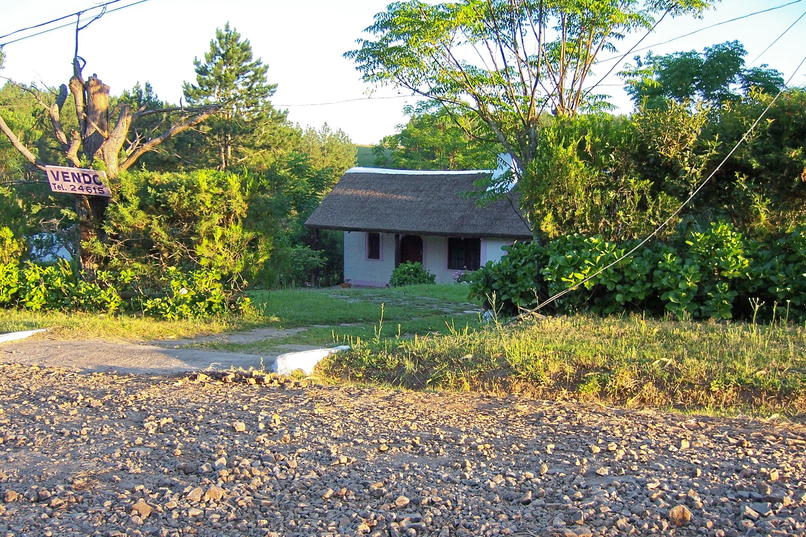 Casa en el balneario Iporá. Vista de una casa en el Balneario Iporá, Tacuarembó, Uruguay.